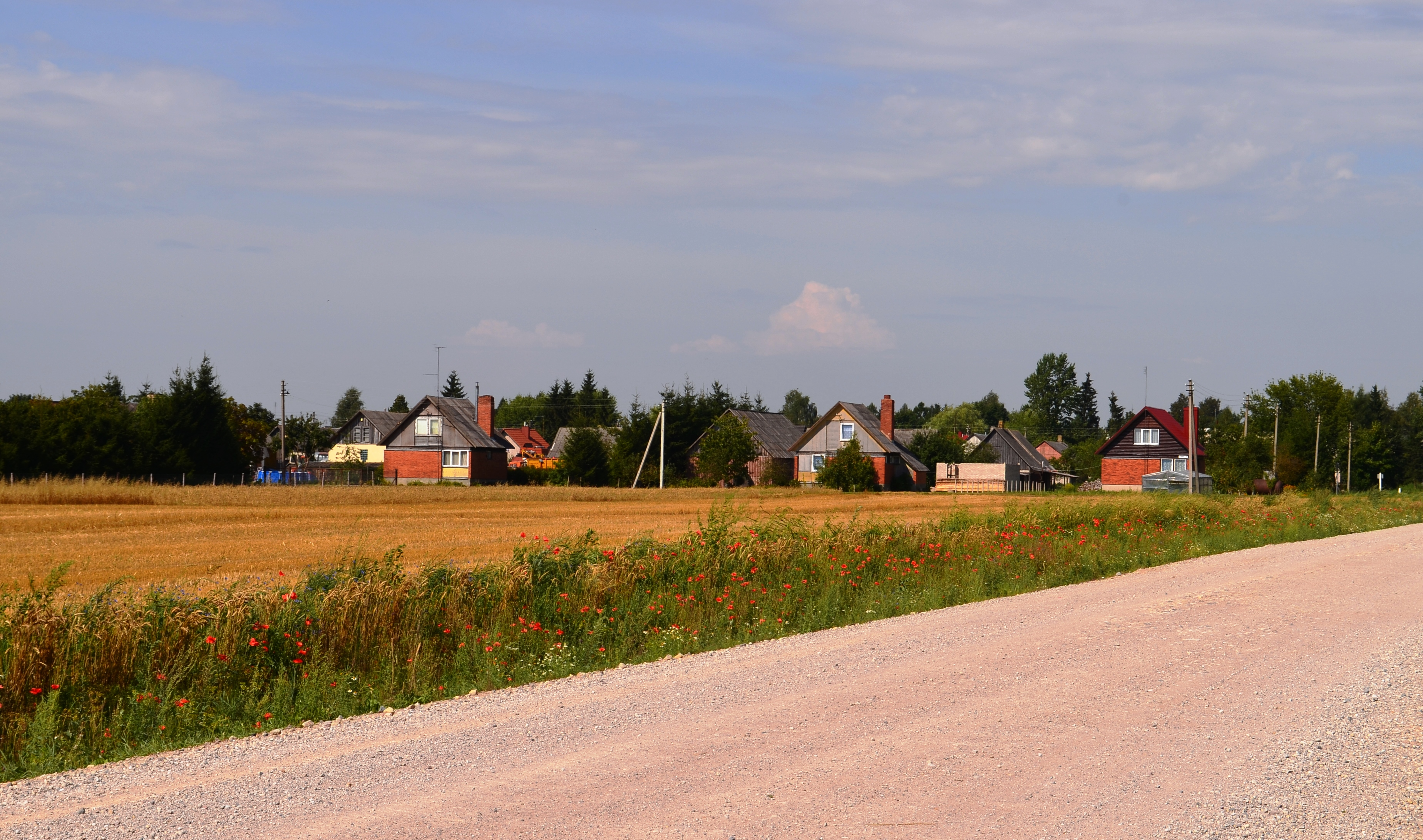 Linkaučiai, Panevėžio r.